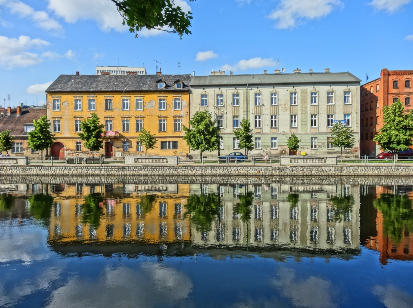 Północne nabrzeże Brdy w centrum Bydgoszczy - bulwar im. Zbigniewa Urbanyi